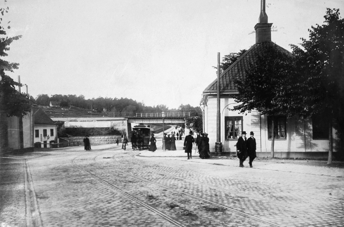 Norrtull sett från söder omkring 1900-1910. Okänd fotograf. Huset till höger är Östra Tullhuset.